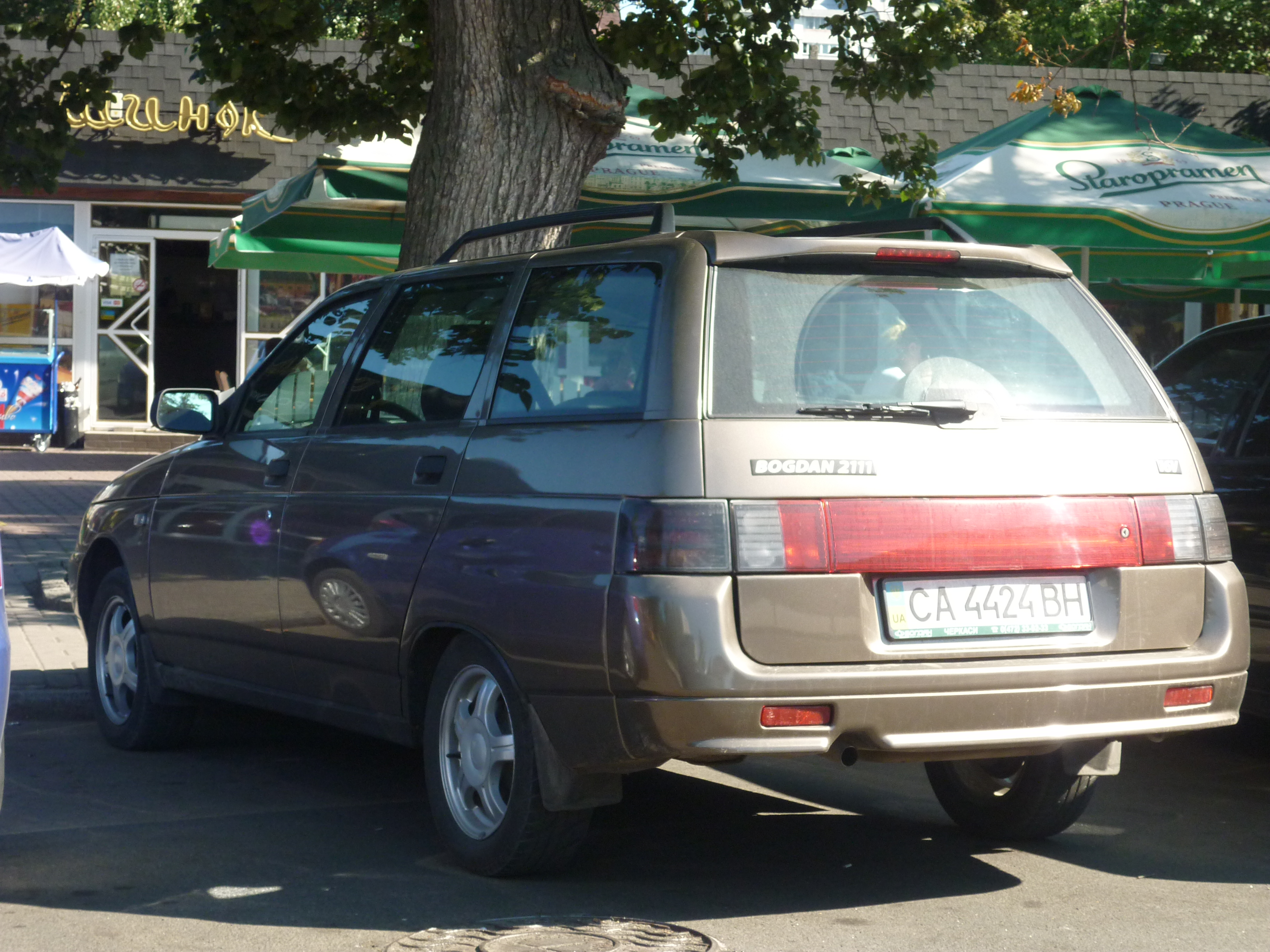 Богдан 2111 у Черкасах